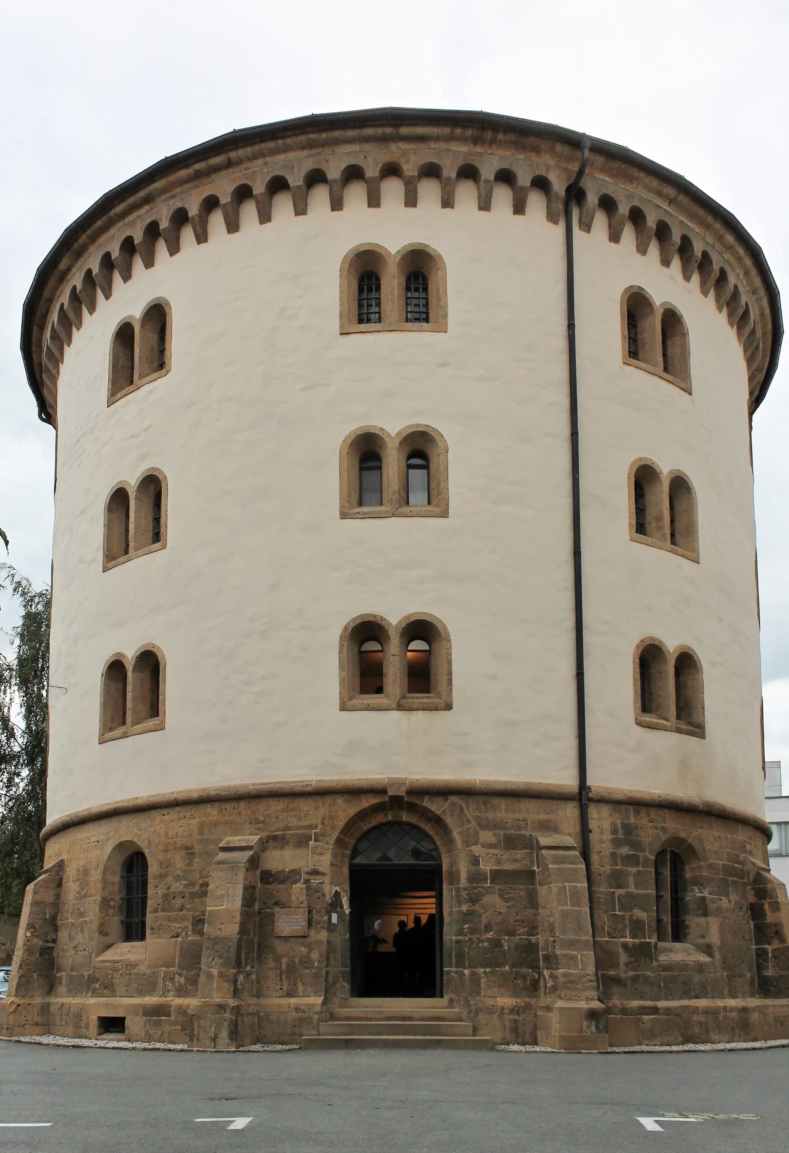 Das ehemalige Amtsgefängnis ("Hutschachtel") in Saalfeld/Saale am Tag des offenen Denkmals 2013.